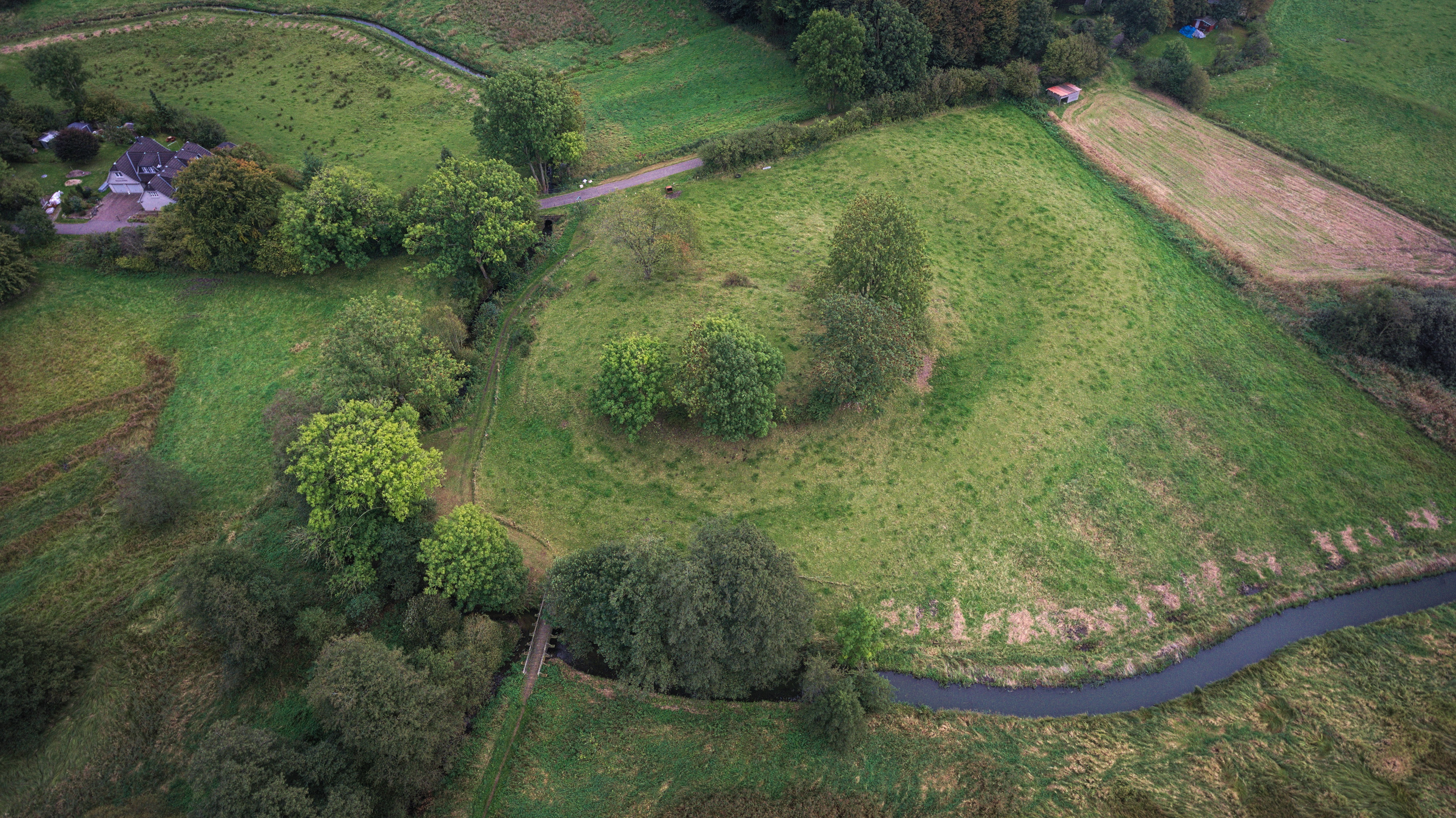 Blick auf die Burgruine mit Graben